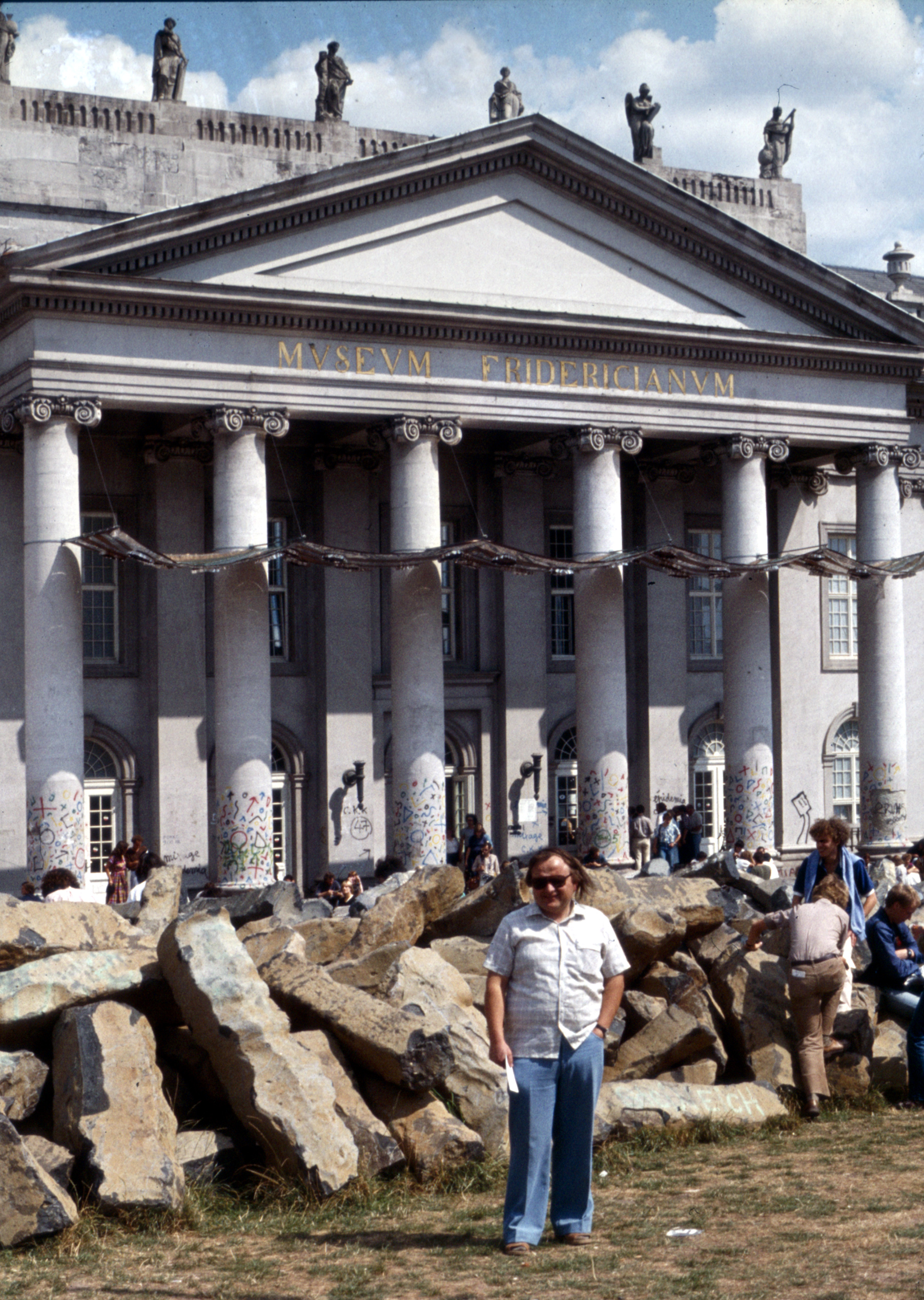 Kassel, Documenta 7, 1982